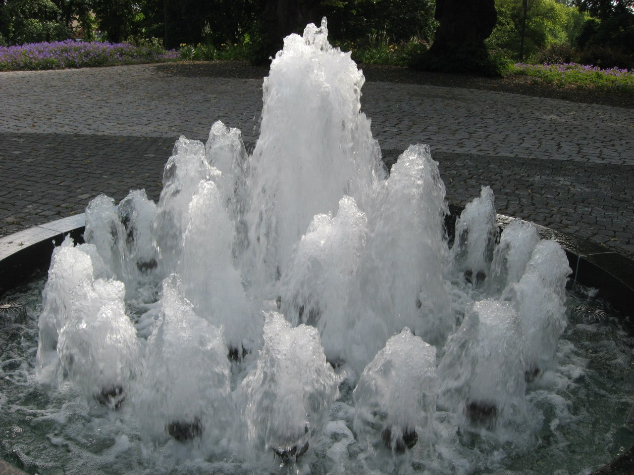 Harjumagi